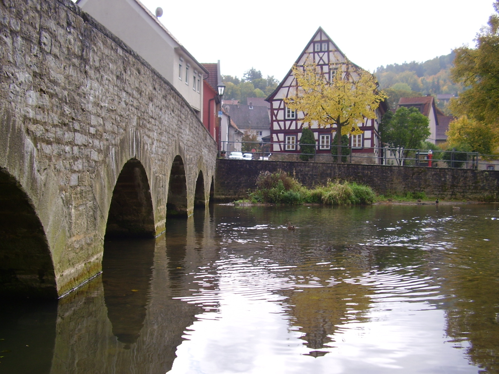 Eine der beiden Sennfelder Steinbrücken über die Seckach.